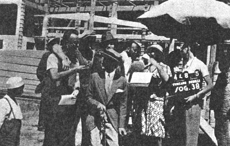 Ragazzo. regia di Ivo Perilli 1934 - produz "Cines" Roma. foto della lavorazione con il regista